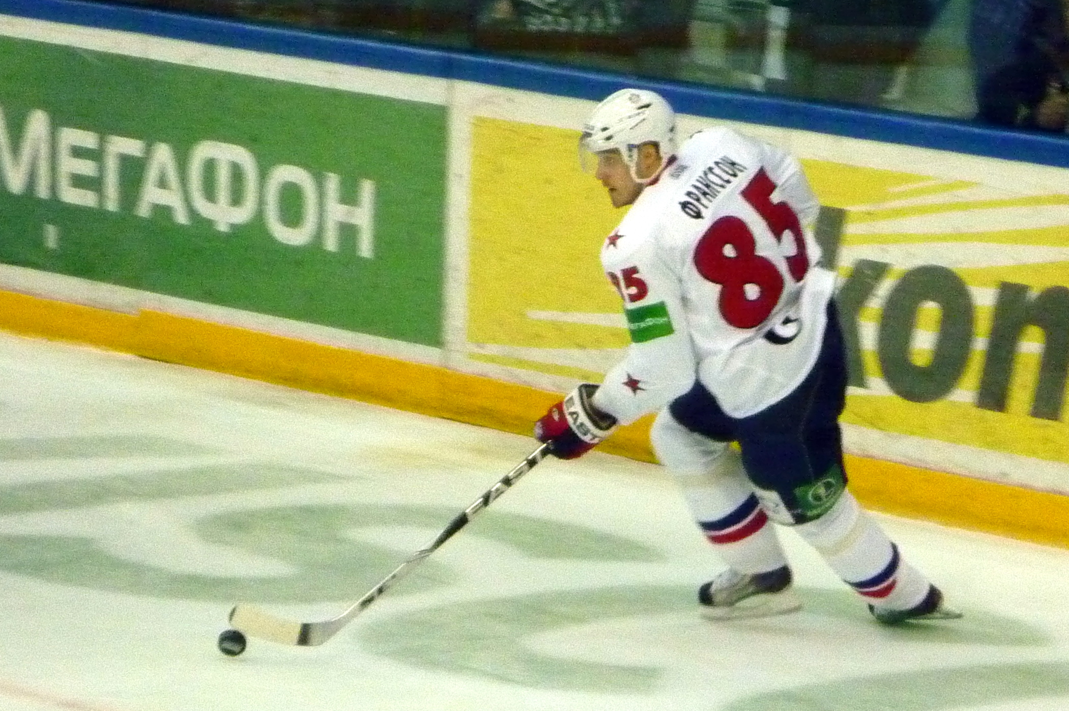 Защитник питерского СКА Юхан Франссон в матче против нижегородского «Торпедо» 12 декабря 2010